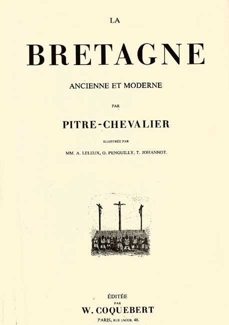 Pitre-Chevalier. Pajenn an titl